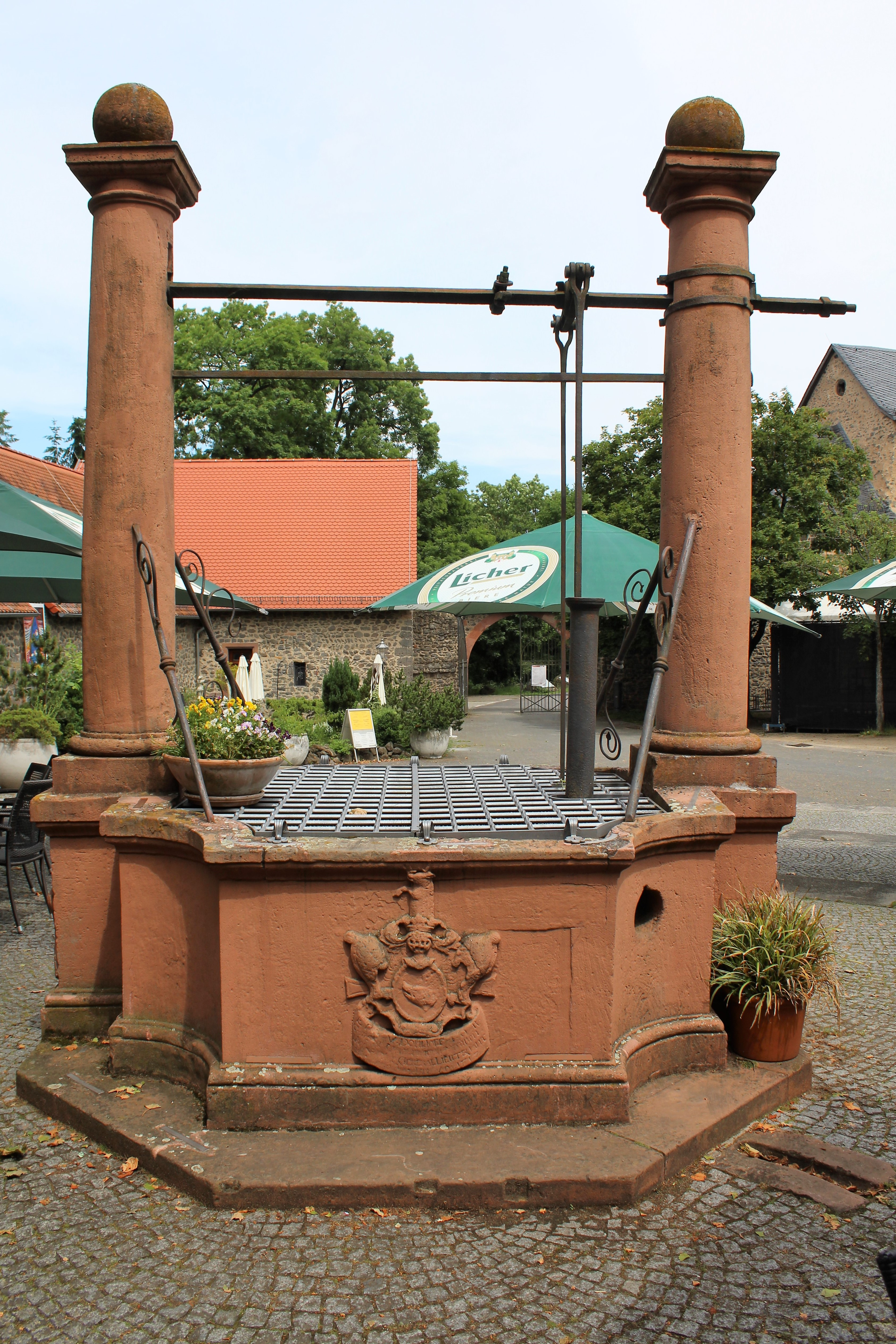 Kloster Schiffenberg, Landkreis Gießen, Hessen, Deutschland